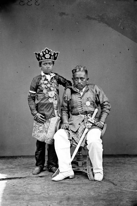 Negatief. Regent van Mandalé, Zuid-Celebes